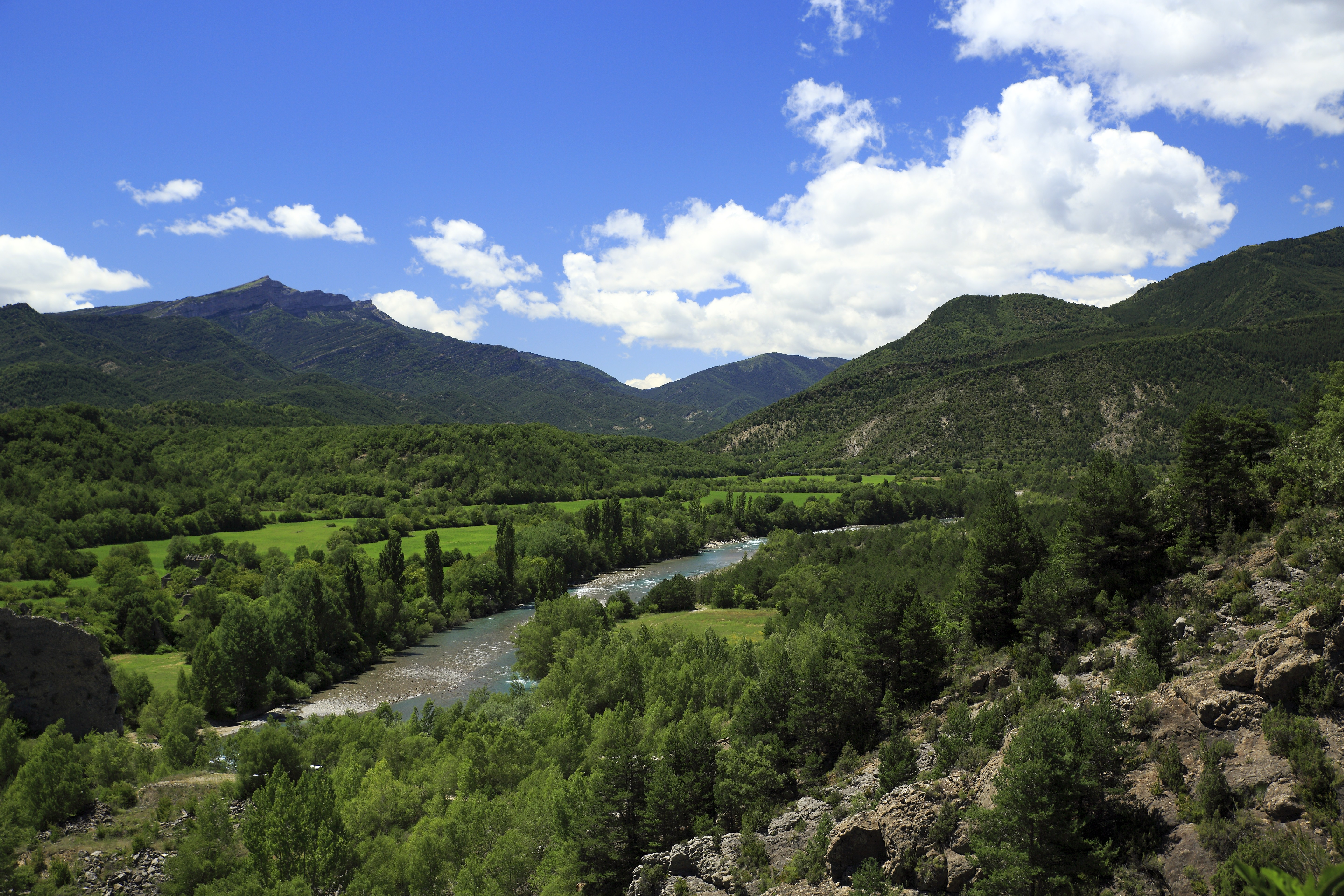 Talboden von Jánovas, das gleichnamige Dorf wurde wegen eines Stauseeprojektes ausgesiedelt, der letzte Einwohner verließ es 1984. Eine Stauanlge wurde jedoch bis heute nicht errichtet.